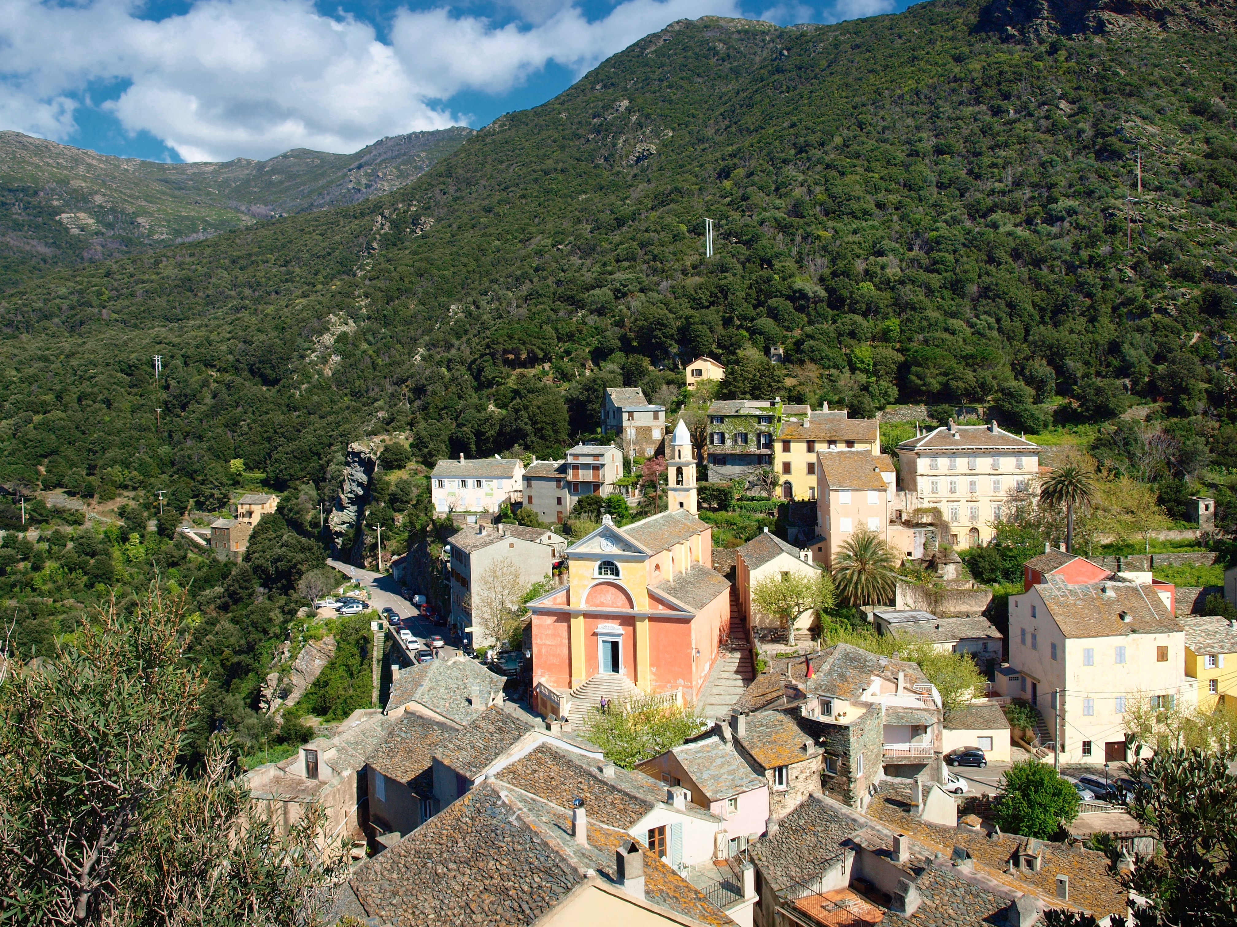 Nonza (Corsica - Vue du village depuis la Tour